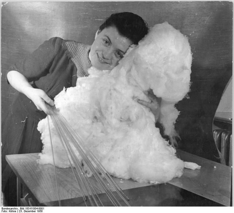 Zentralbild-Köhne 23.12.1958 Glasindustrie hilft der Chemie - Institut für Glastechnik Ilmenau. Die wirksame Unterstützung des Chemie-Programms durch die Betriebe der Thüringer Glasindustrie stellte der Leiter des Instituts für Glastechnik Ilmenau, der Verdiente Techniker des Volkes Ingenieur Hübscher, in einem ADN-Gespräch in Aussicht. U.a. nannte er ein wichtiges Entwicklungsergebnis seines Institutes, das Herstellungsverfahren für superfeine Glasfasern. Die superfeine Glasfaser, mit deren Produktion auf diesem Gebiet der Glastechnik der Anschluß an den gegenwärtigen Entwicklungsstand in den USA und in Westdeutschland erreicht wird, ist ein aus Glasstäben gezogenes Fädchen, dessen Dicke noch weit unter einem 3-1000 Millimeter liegt. In der Praxis hat sich dieses Produkt bereits bei der versuchsweisen Herstellung von Papier bewährt, das u.a. für Isolationszwecke in der Elektroindustrie genutzt werden kann. UBz: Die technische Laborantin Lore Hauswald beweist, dass die neue Glasfaser nicht mehr stachelt und zeigt dem Besucher Glasstäbe, den Grundstoff für die Glasfaser.